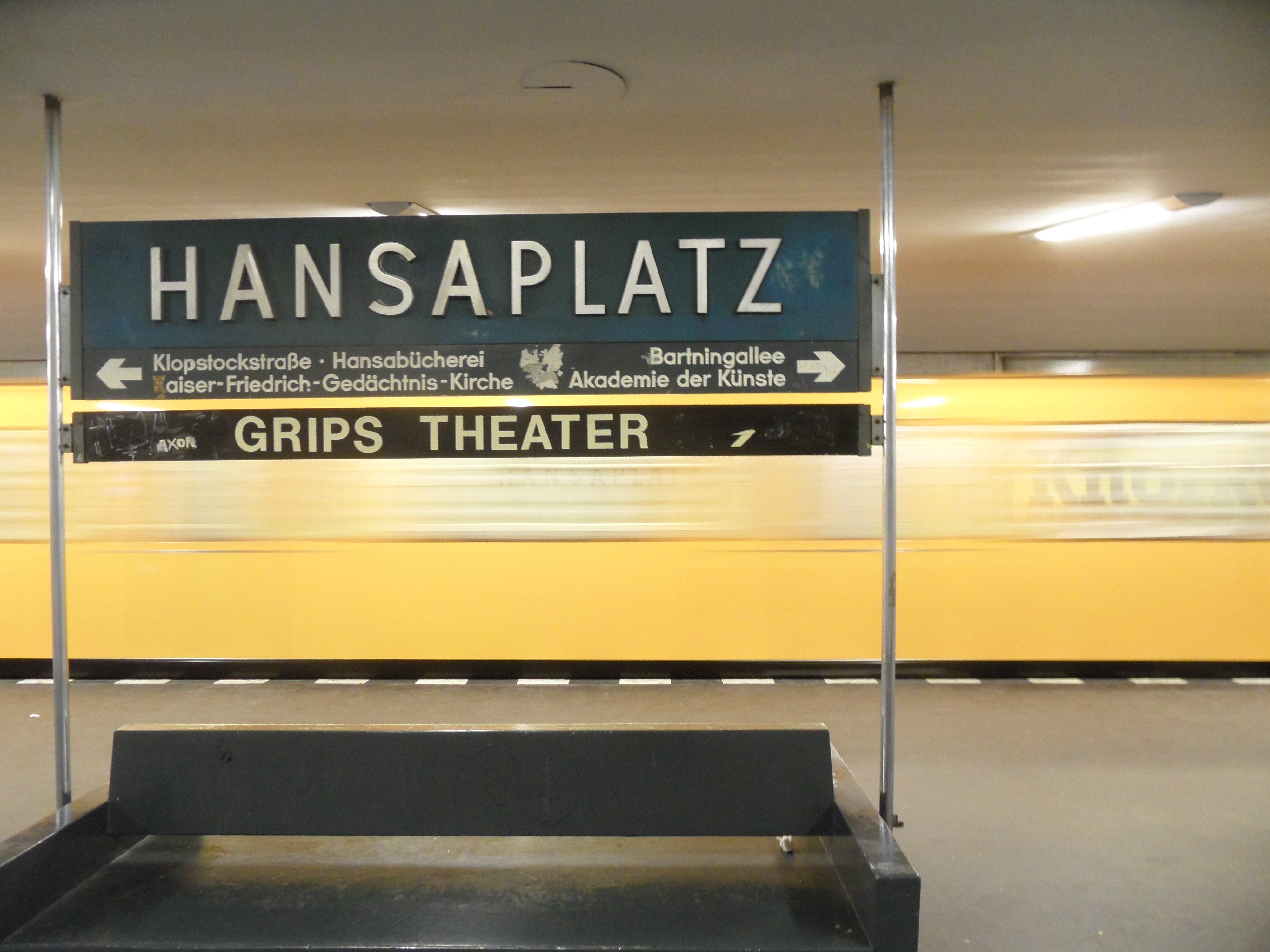 Berlin - U-Bahnhof Hansaplatz - Linie U9